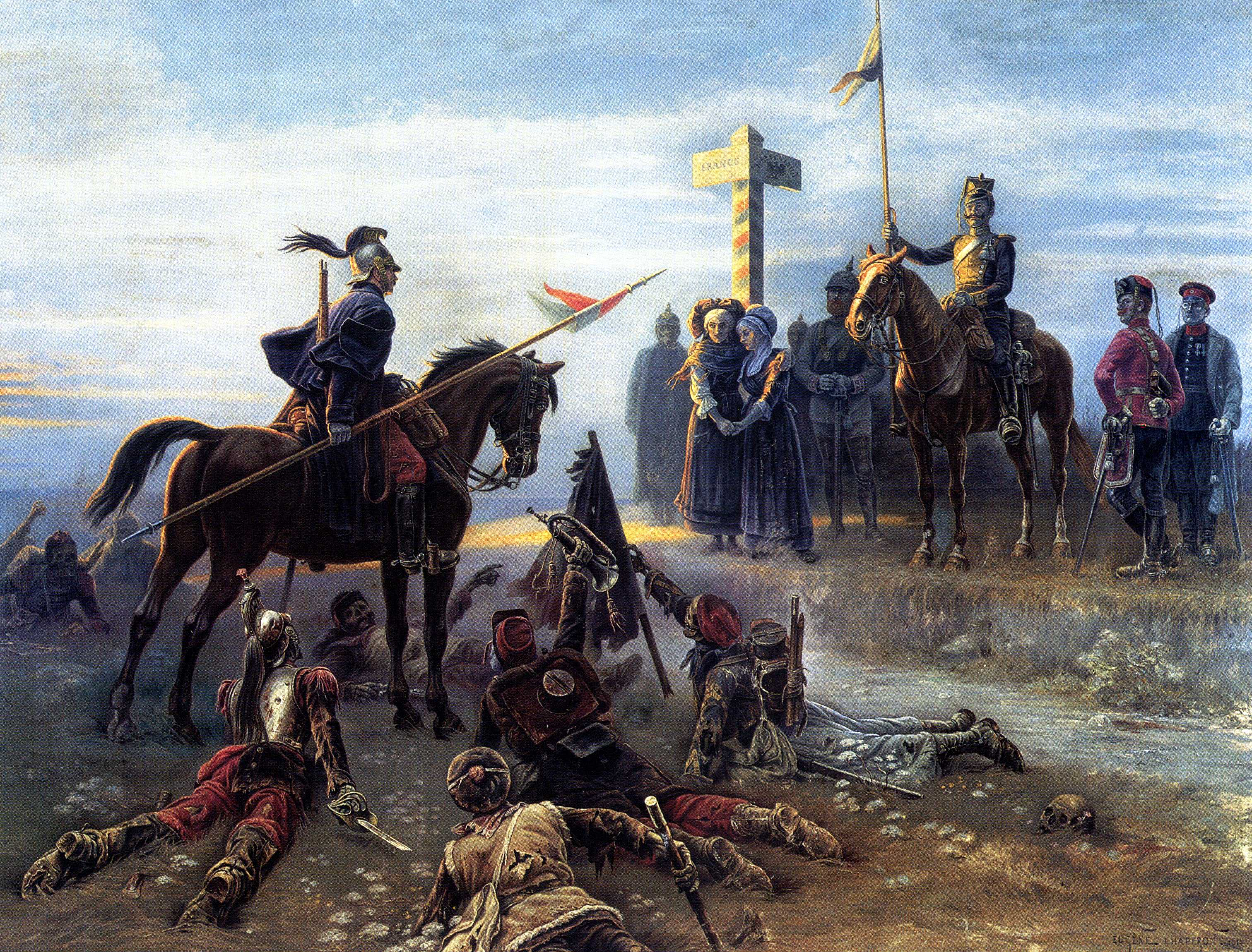 Tableau présenté au salon de 1914, présentant un cavalier français face à la frontière alsacienne.